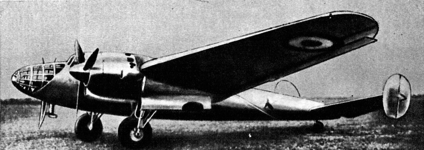 Francuski samolot bombowy Amiot 351.